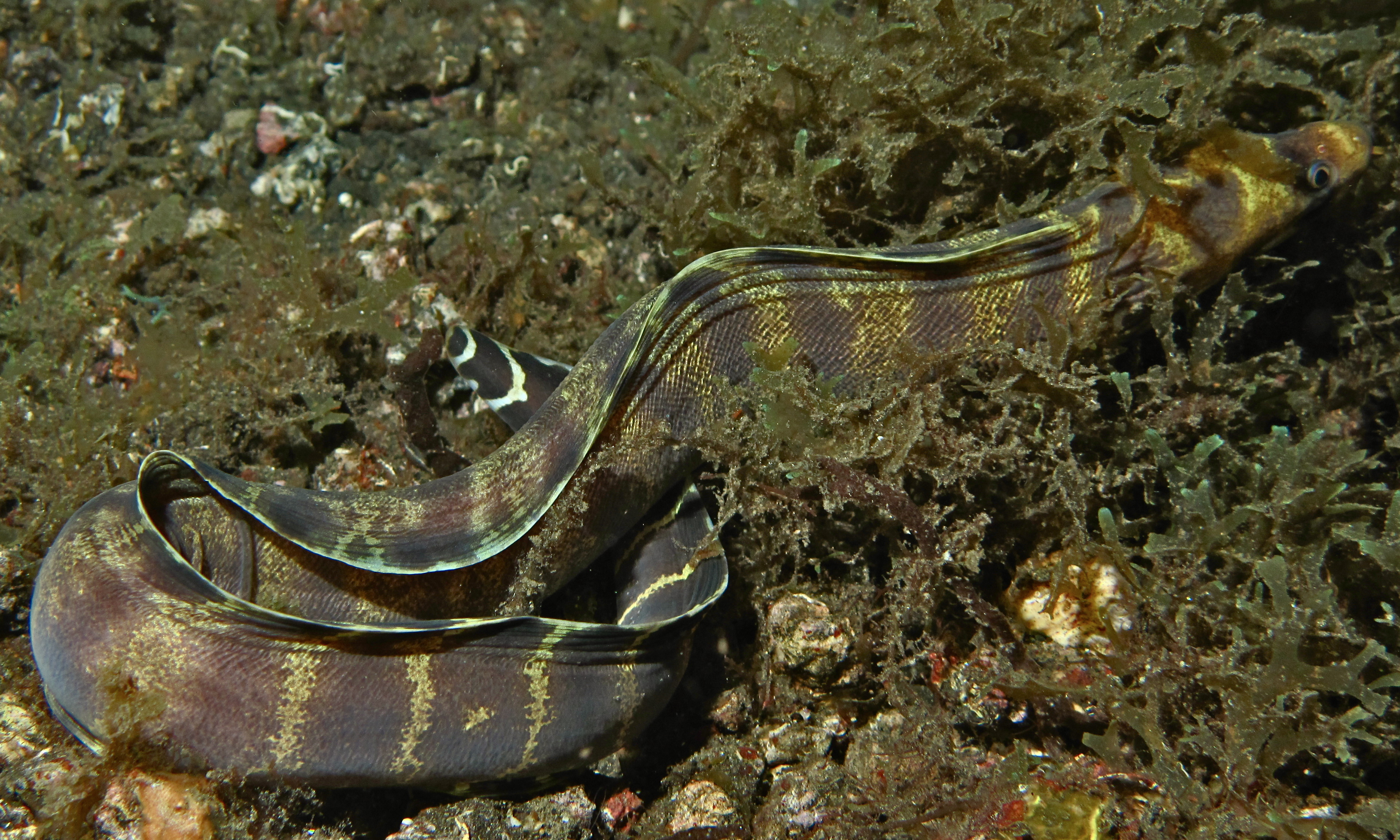 Jahir, Lembeh Strait, Sulawesi, INDONESIA